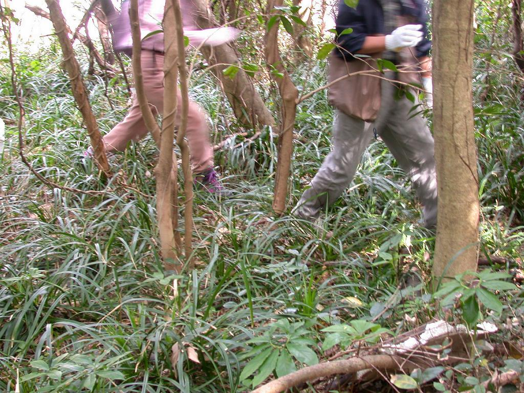 2004/04/11 和歌山県田辺市：Tanabe City. Wakayama Pref. Japan